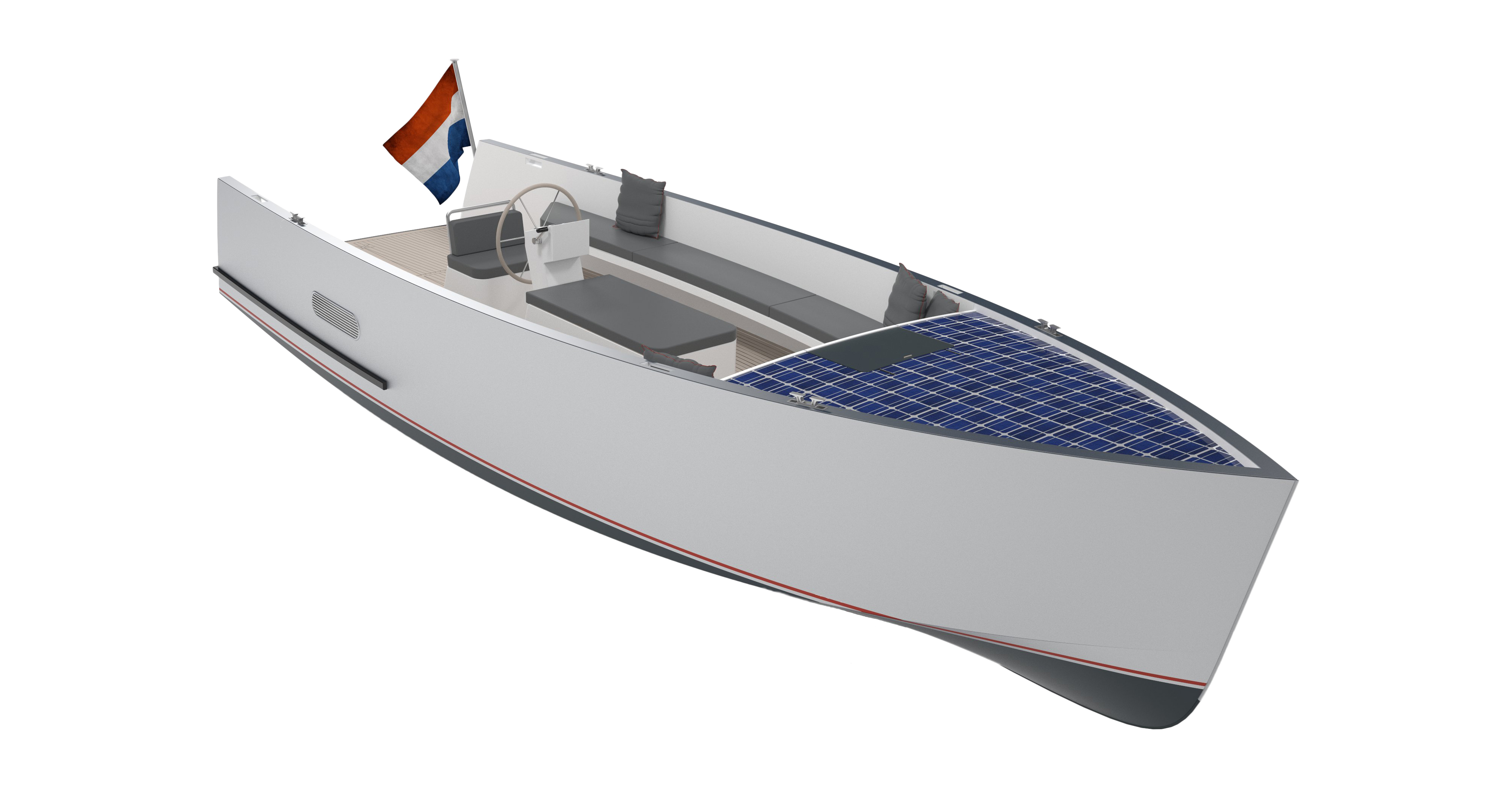 De door Brandkuip Yacht Design geproduceerde Trip 880 Hybrid